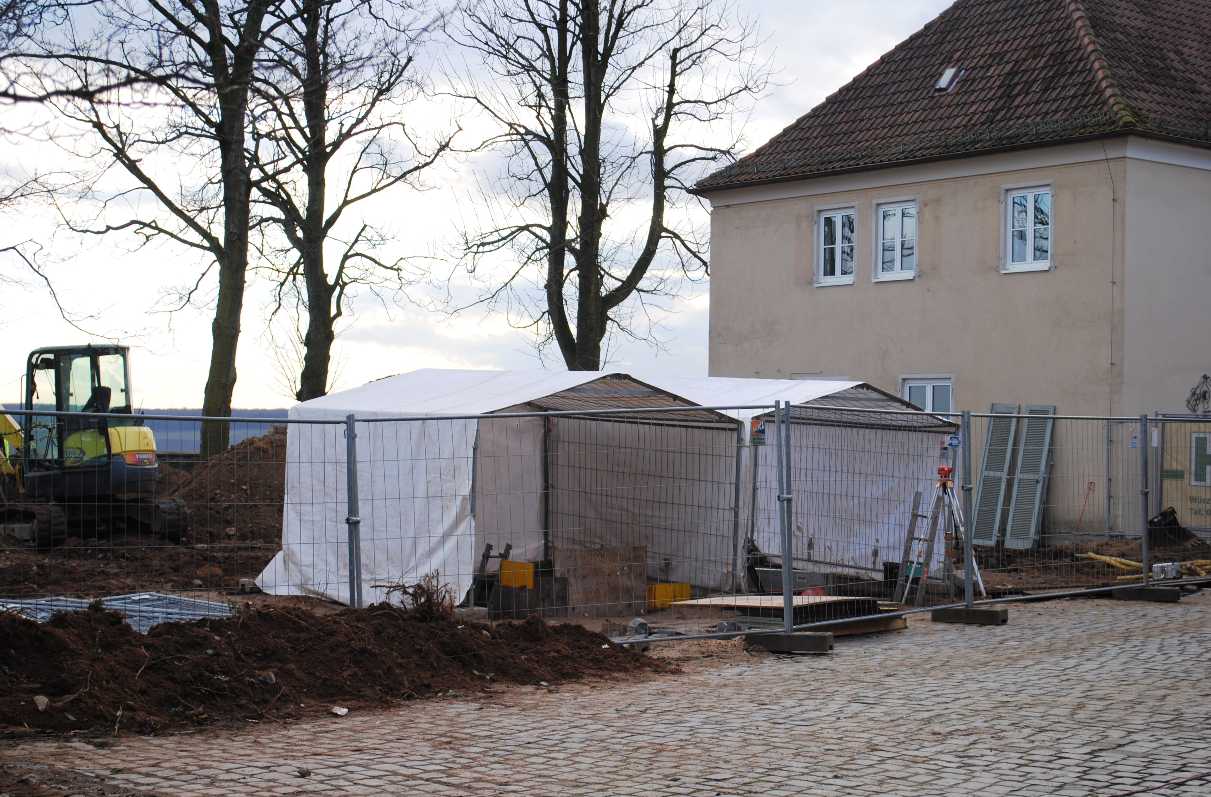 Ausgrabung 2014, Vogelsburg, Volkach